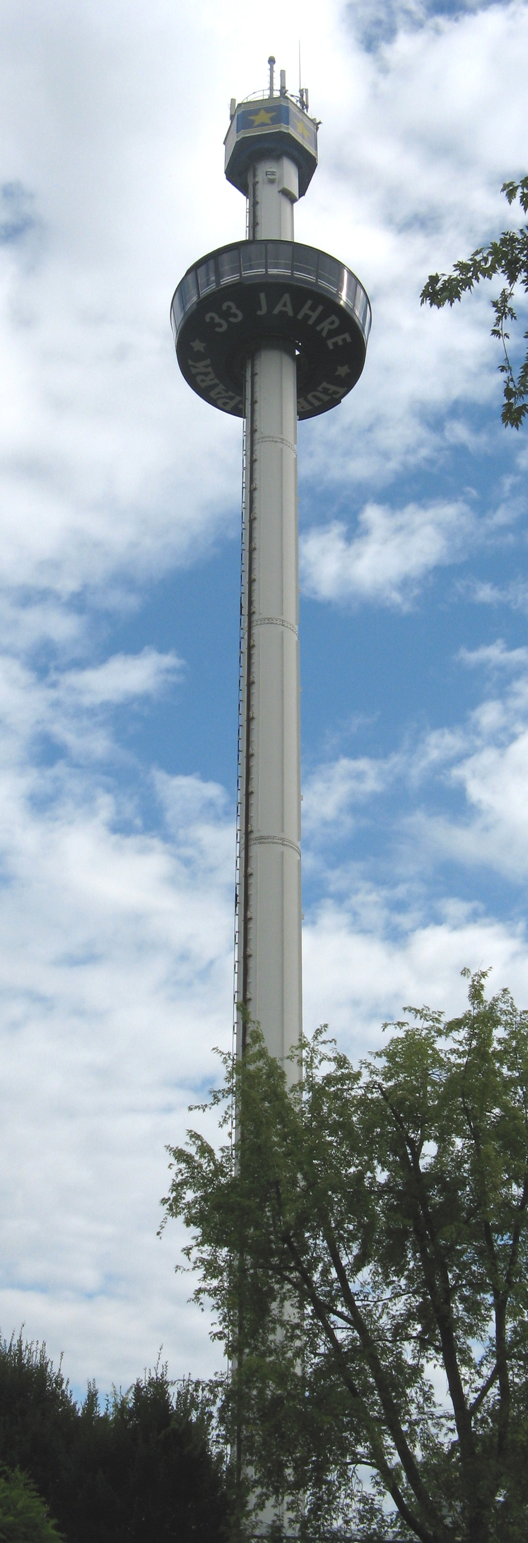 Der Tour St. Jacques der Gartenbauaustellung Grün 80 steht heute im Europapark